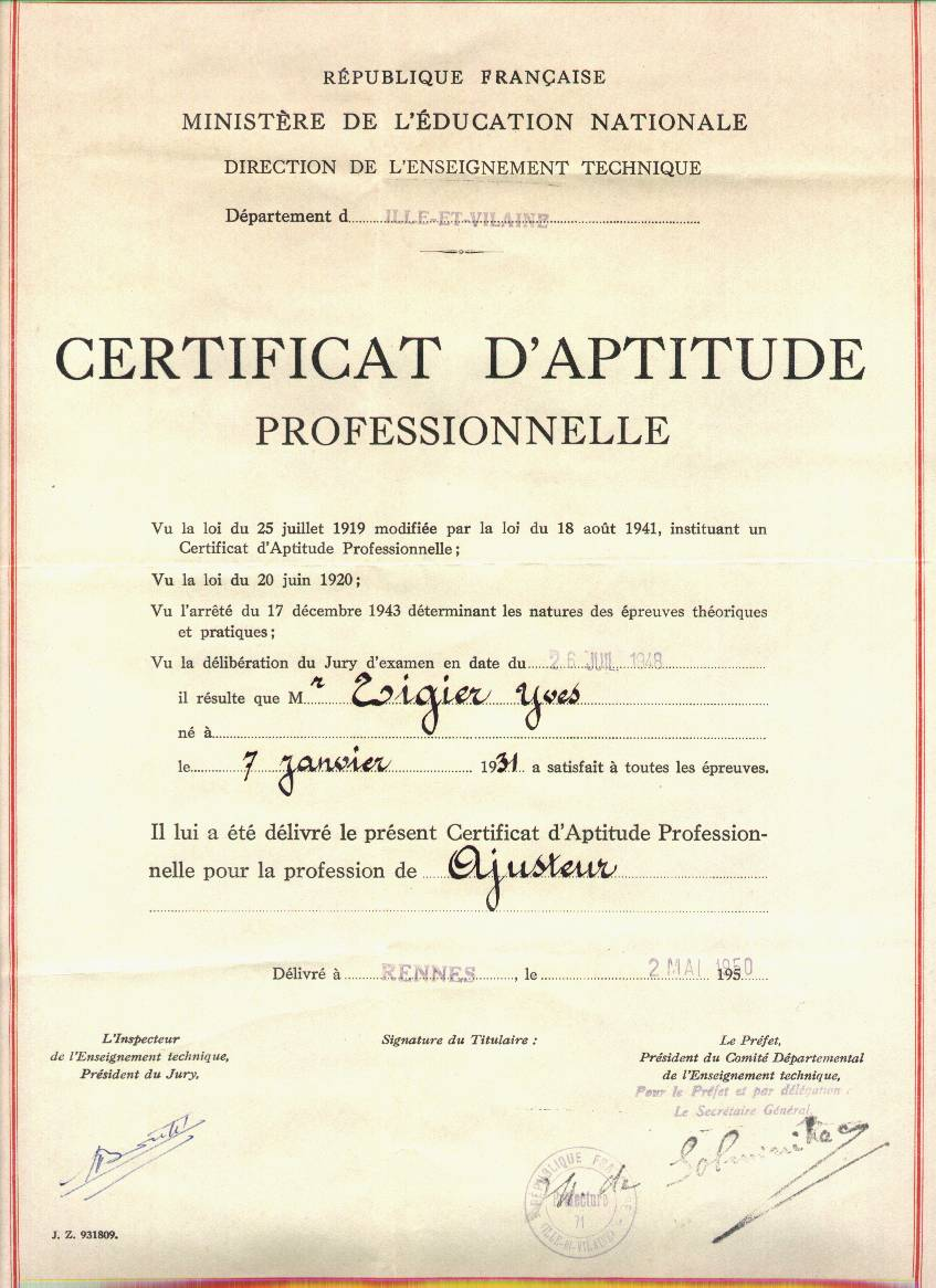 Diplôme du Certificat d'aptitude professionnelle (CAP) {délivrè en 1987 à boulazac (24)).